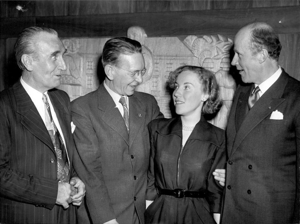 En succé blev den årsmiddag som utlandssvenskarna på onsdagen anordnat på Gillet. "Det finns inga större patrioter än utlandssvenskarna", framhöll någon, "och bland dem kan man träffa på många hjältar i det tysta, som med kärlek hävdar Sveriges sak varenda dag därute i världen." På bilden Victor Berge, Bengt Pettersson, Ibe Karlsson och Bo Lindman.